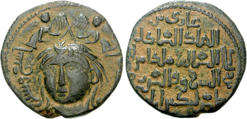 Dirrã de Ceifadim Gazi II emitido em 1171-1172